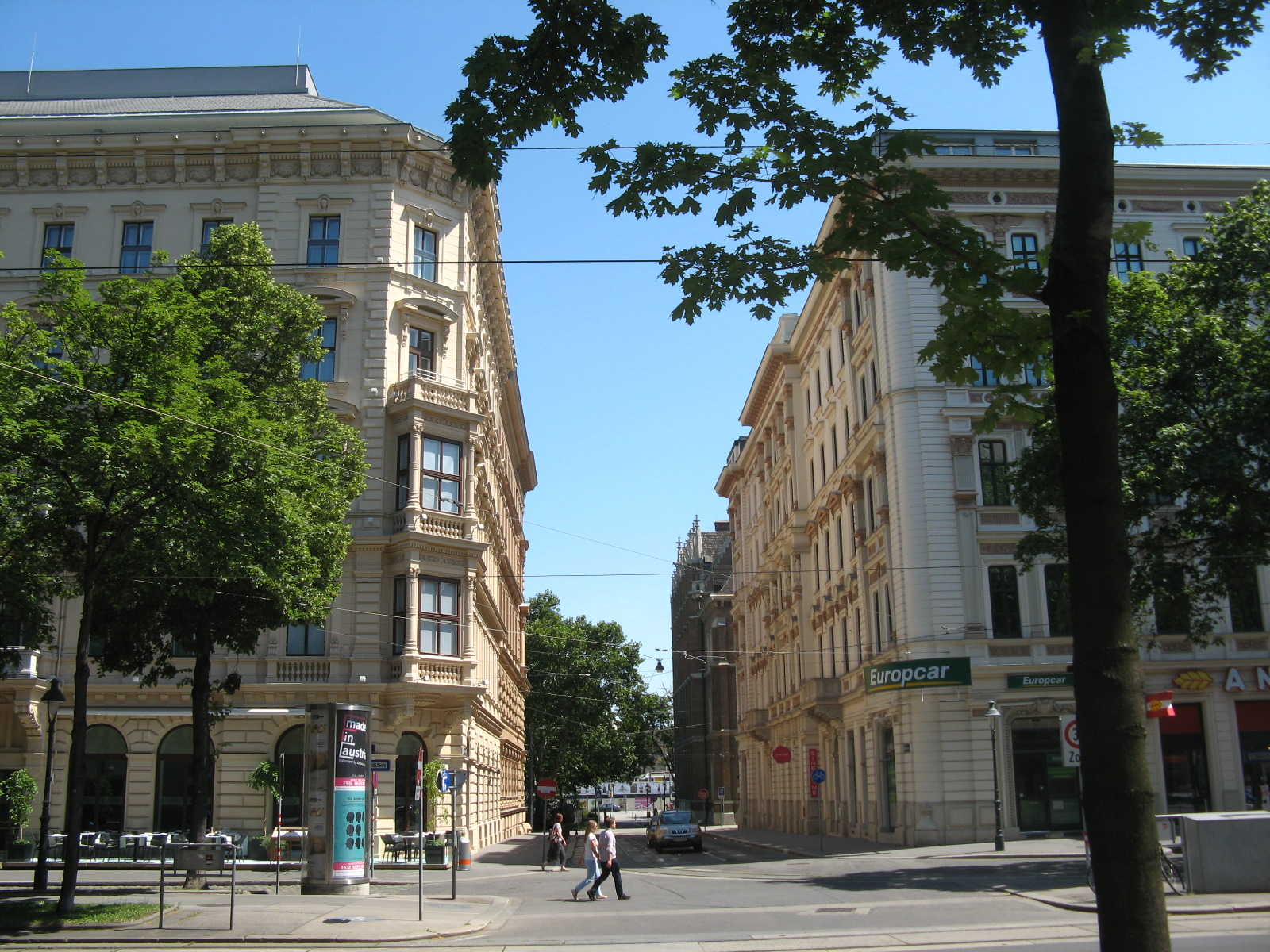 Christinengasse von der Ringstraße aus gesehen, Wien-Innere Stadt